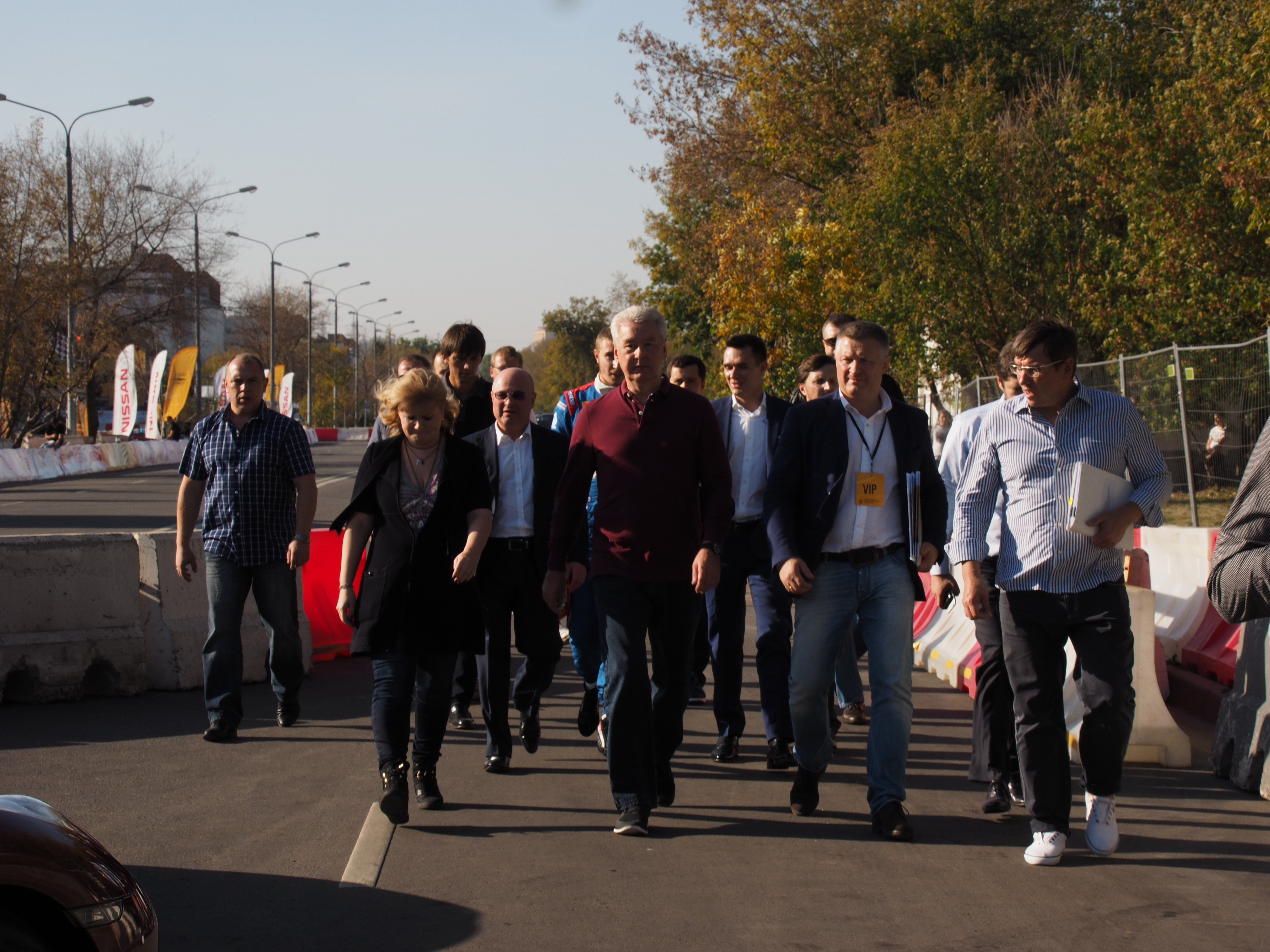 На фото - справа налево: О.Е. Бочаров, И.В. Ищенко, С.С. Собянин, Н.А. Сергунина. Москва, 2015 год.